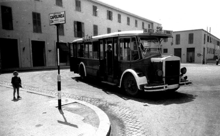 Autobus Fiat 656 della rete urbana di Roma